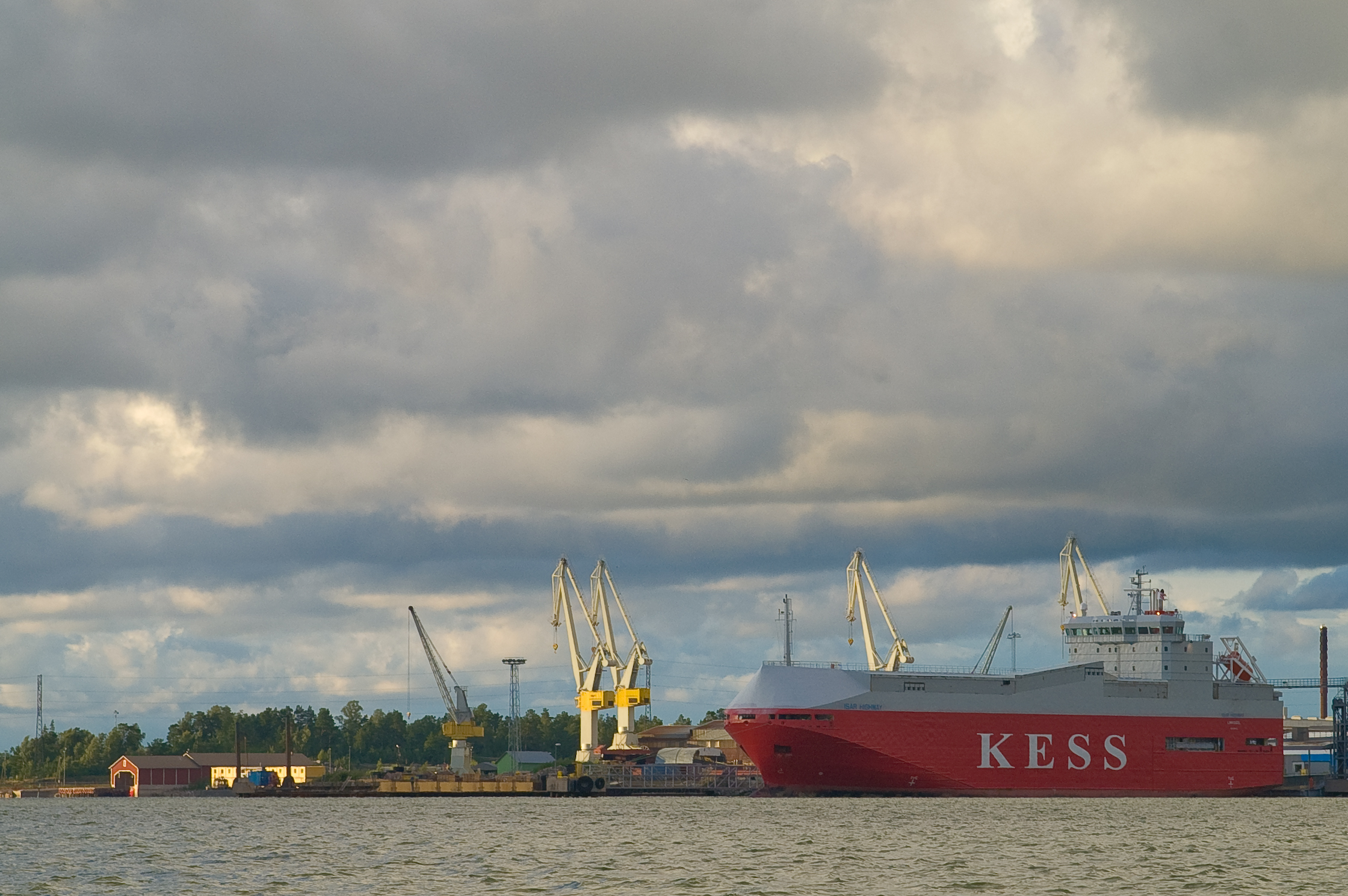 Uudenkaupungin satama